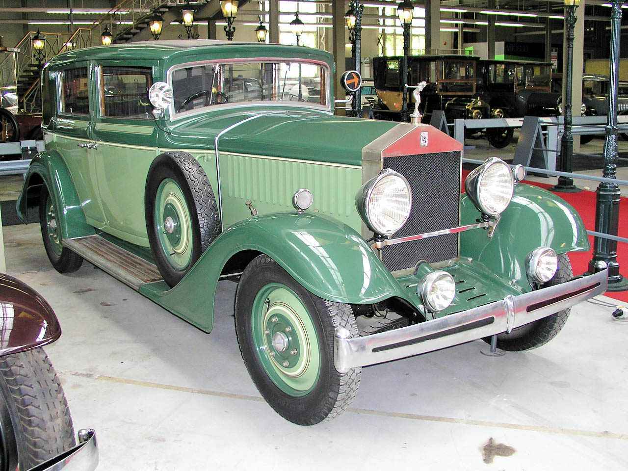 luxury car based on French Sizaire Frères designs, made in Belgium by Sté Belge des Automobiles Sizaire; right front-side view